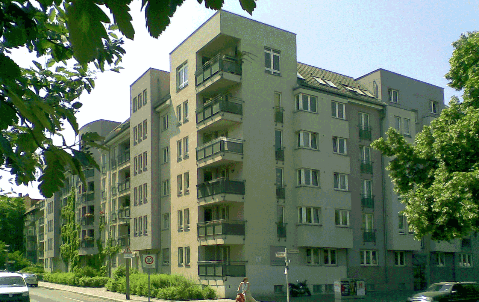 Die Nachwendebauten ergänzen die Sammlung von „Gebrauchsarchitekur“ im Wohnungsbau der Ostseestraße